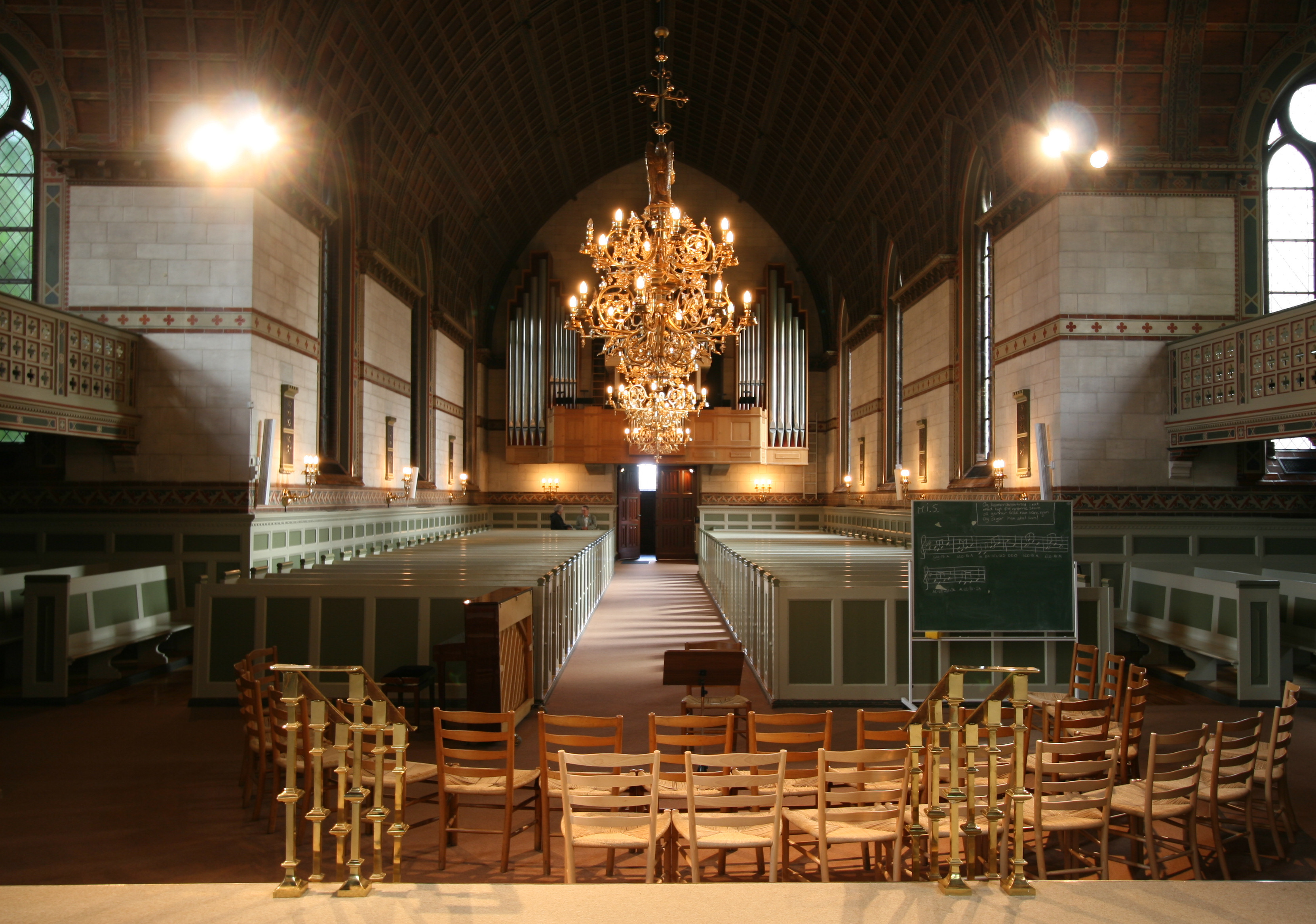 Hellig Kors Kirke, Copenhagen, Denmark. Interior viewed from altar